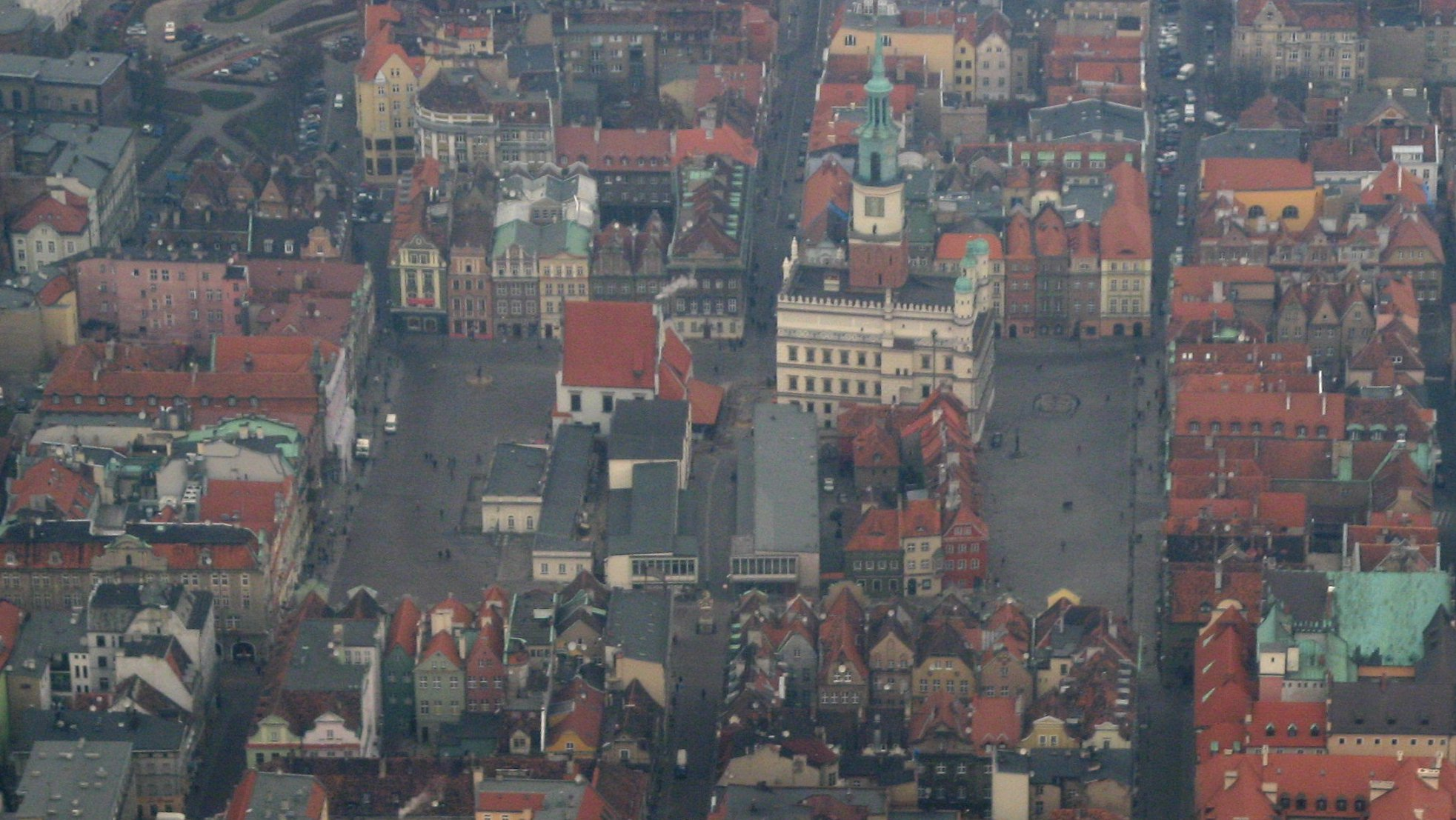 Poznan z lotu ptaka